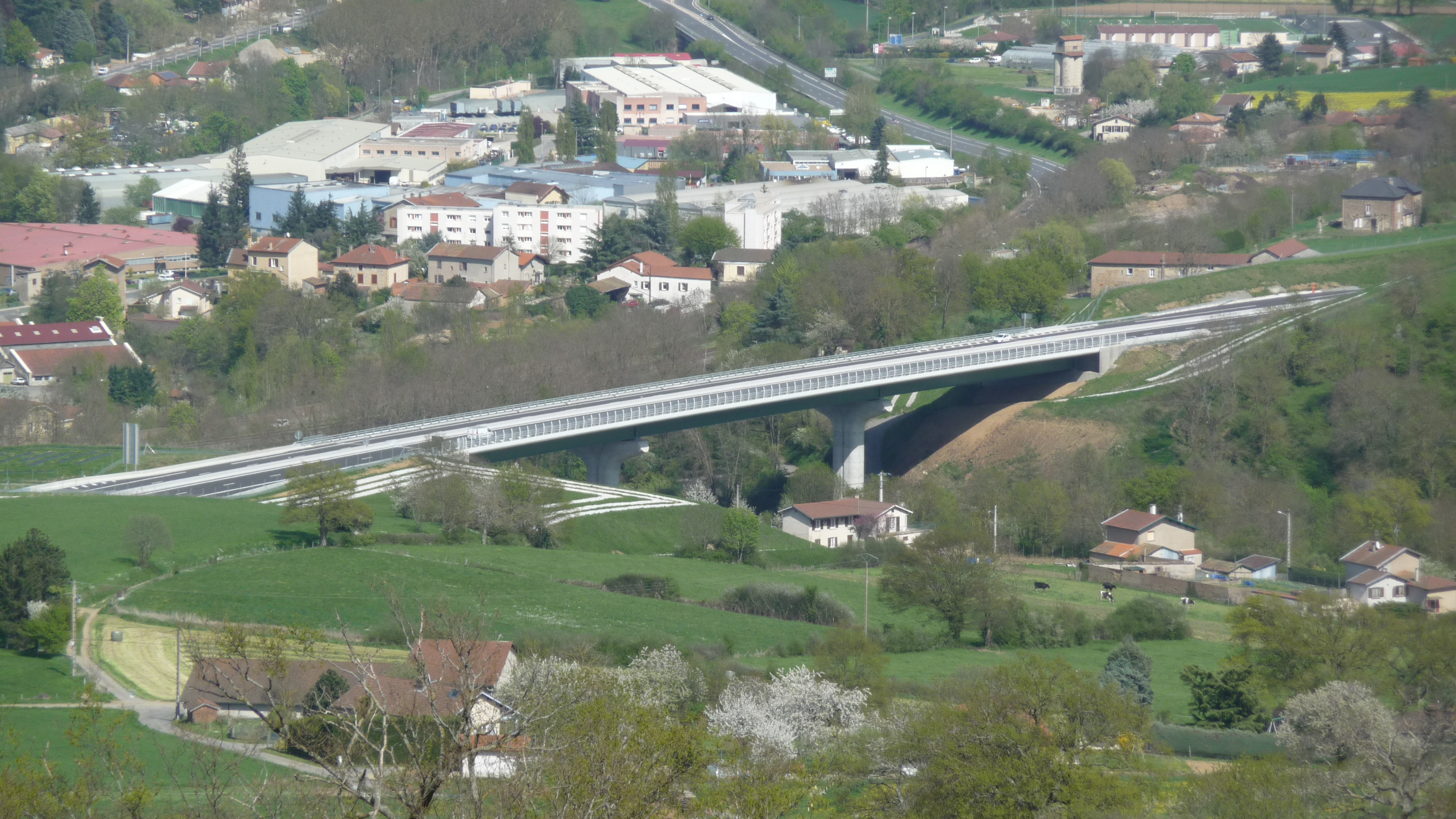 Pontcharra-sur-Turdine - vue d'ensemble - viaduc du trorranchin